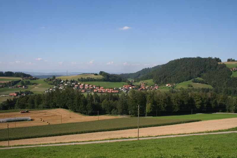 Oberscherli